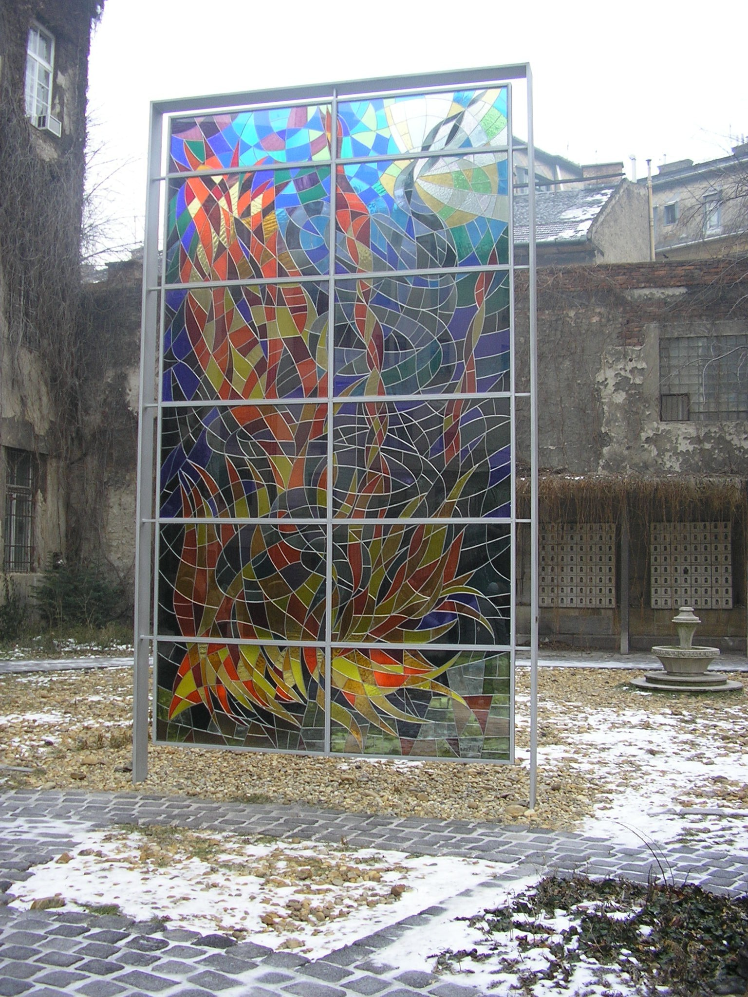 Wallenberg monument in Budapest